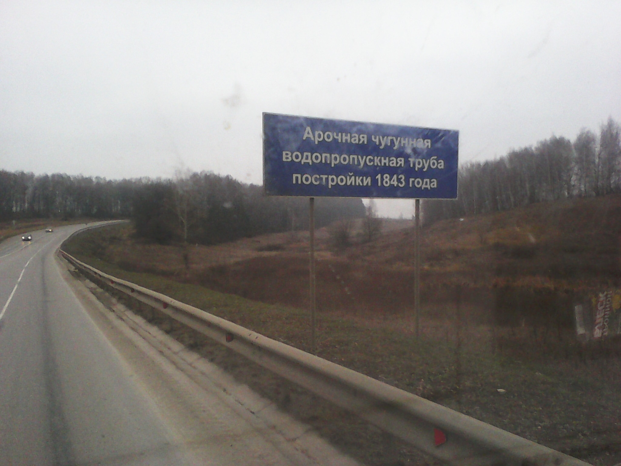 Труба М2